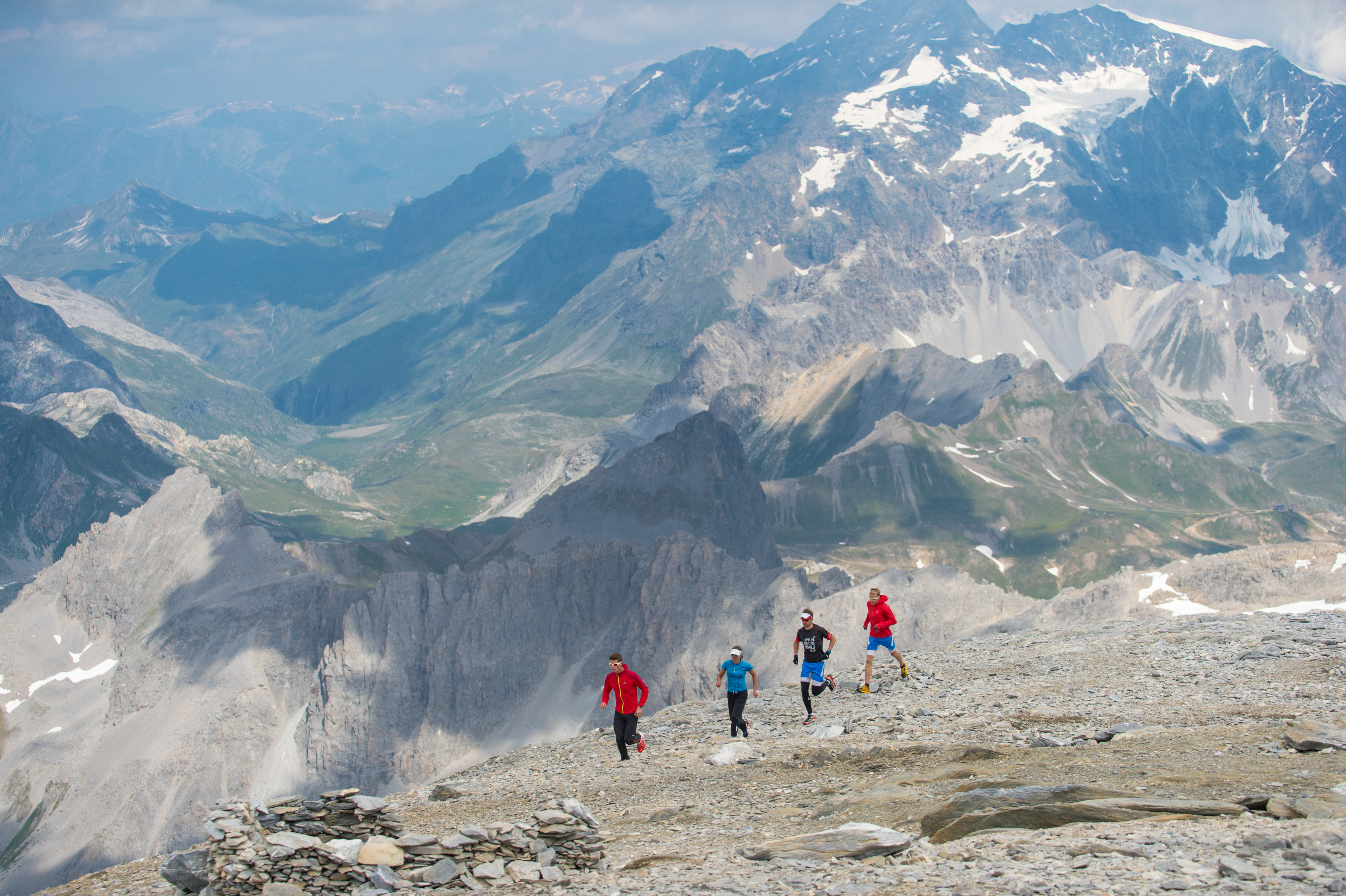 EK Skyrunning 2015